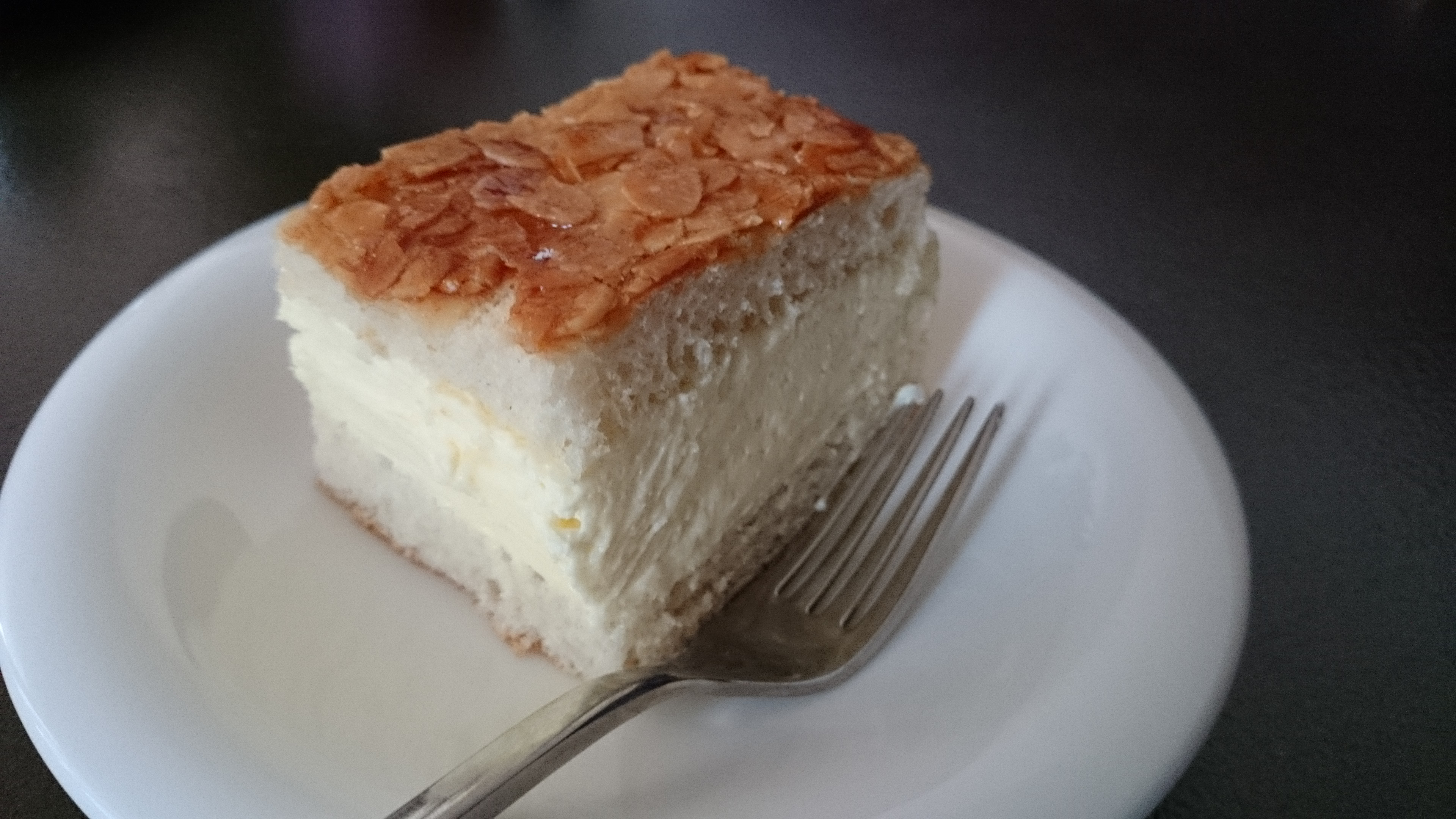 Bienenstich klassisch mit Heftig, Puddingcreme und Mandelkaramell